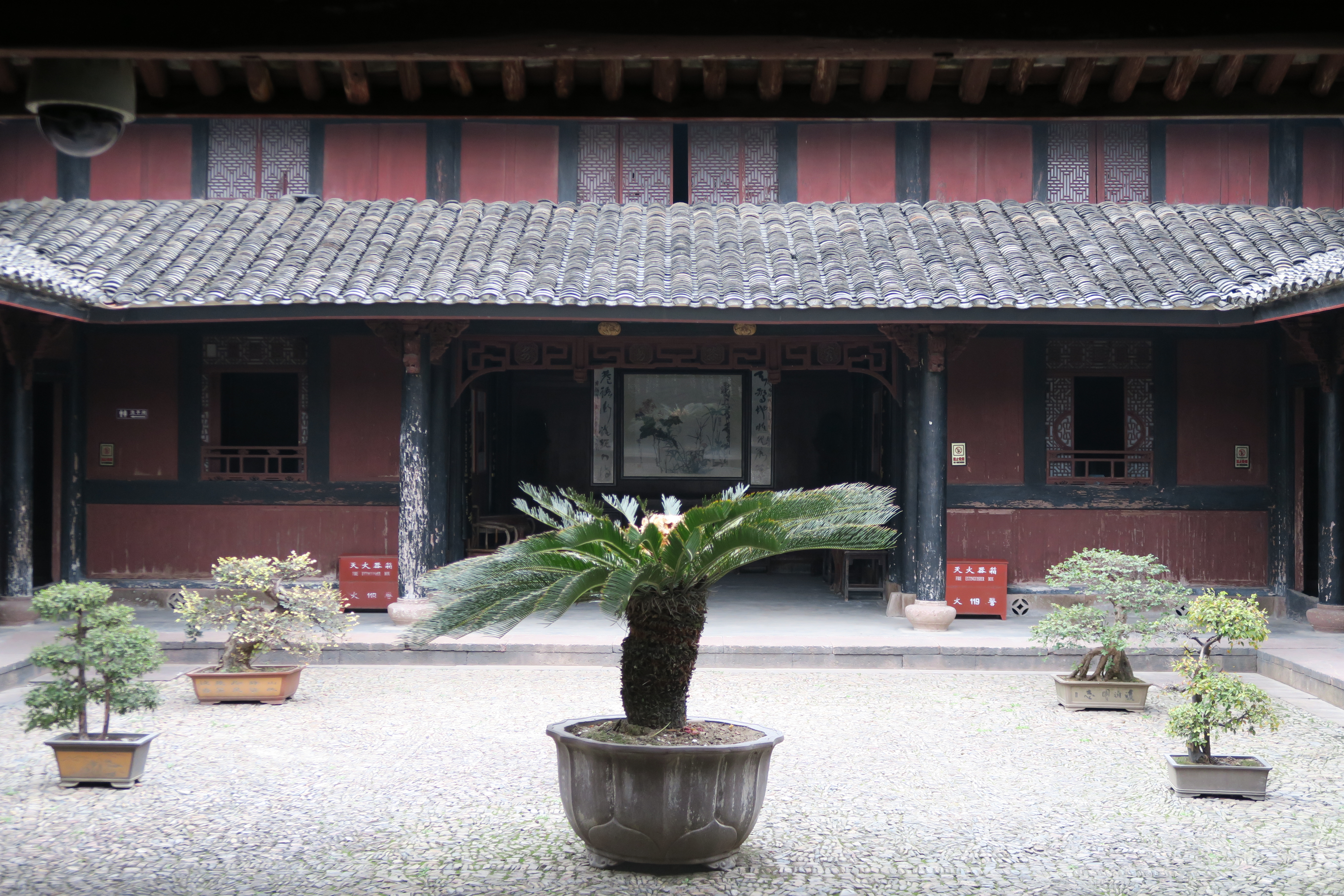 宁海潘天寿故居